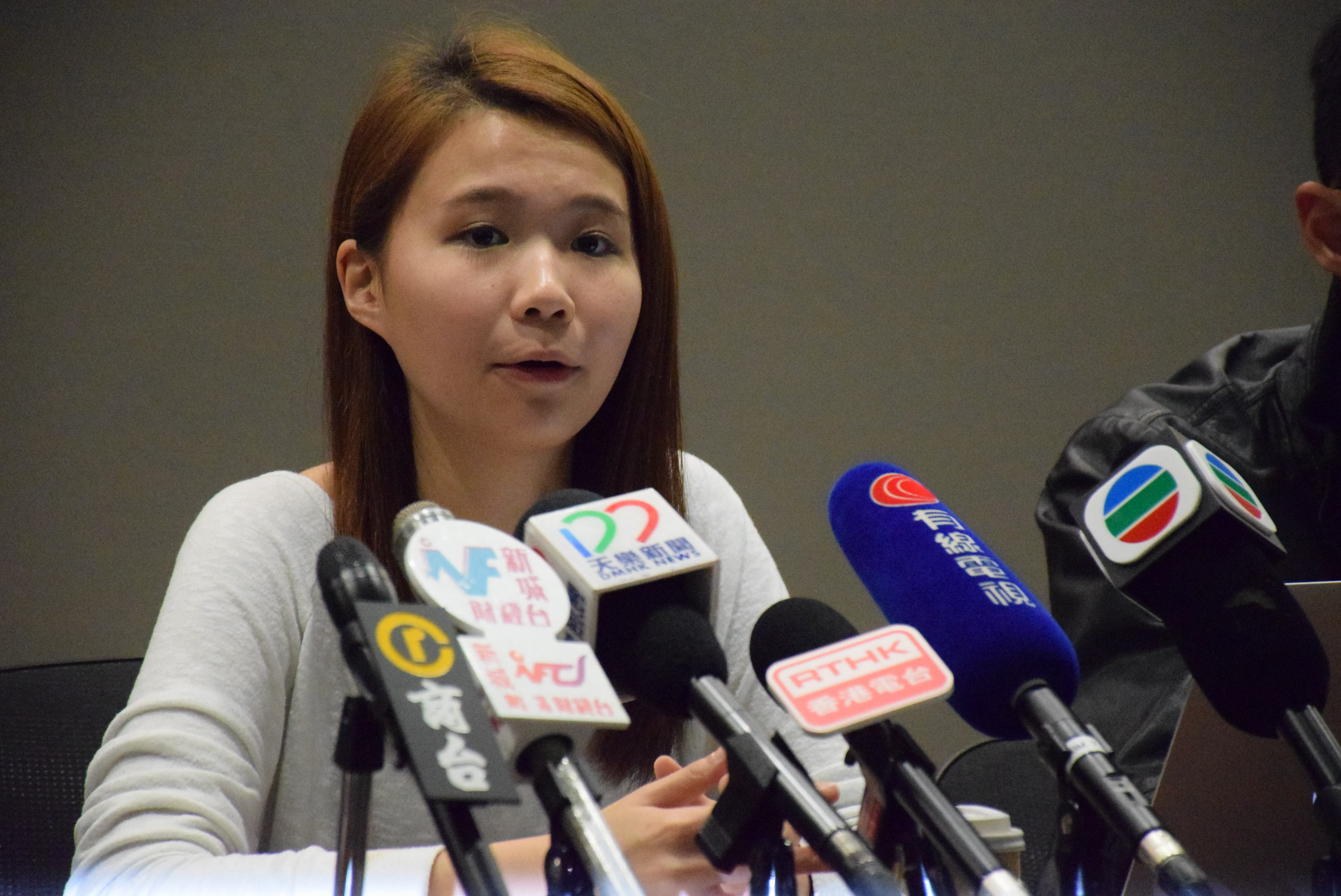 粵語: 鄺頌晴見記者。